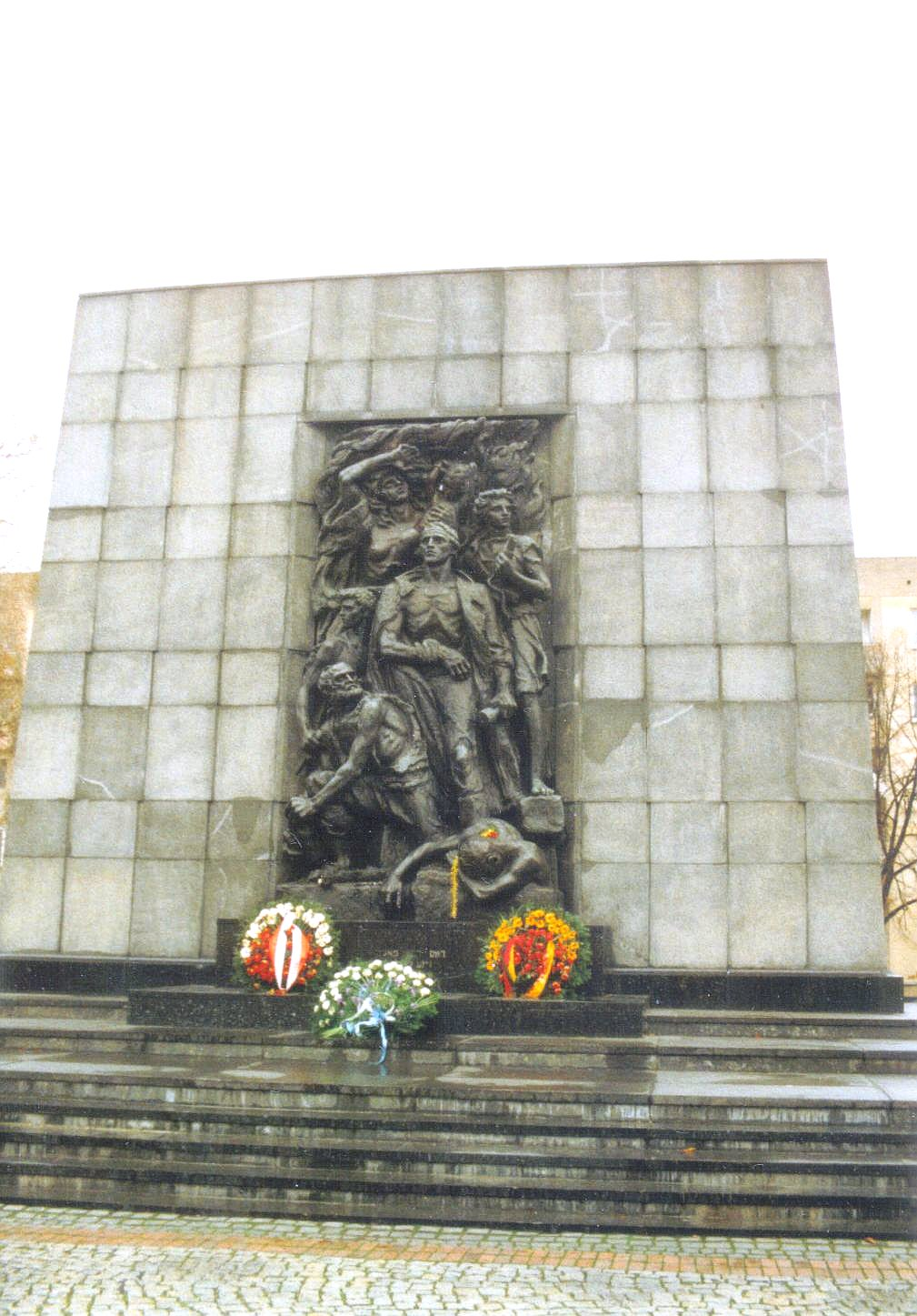 Denkmal in Warschau